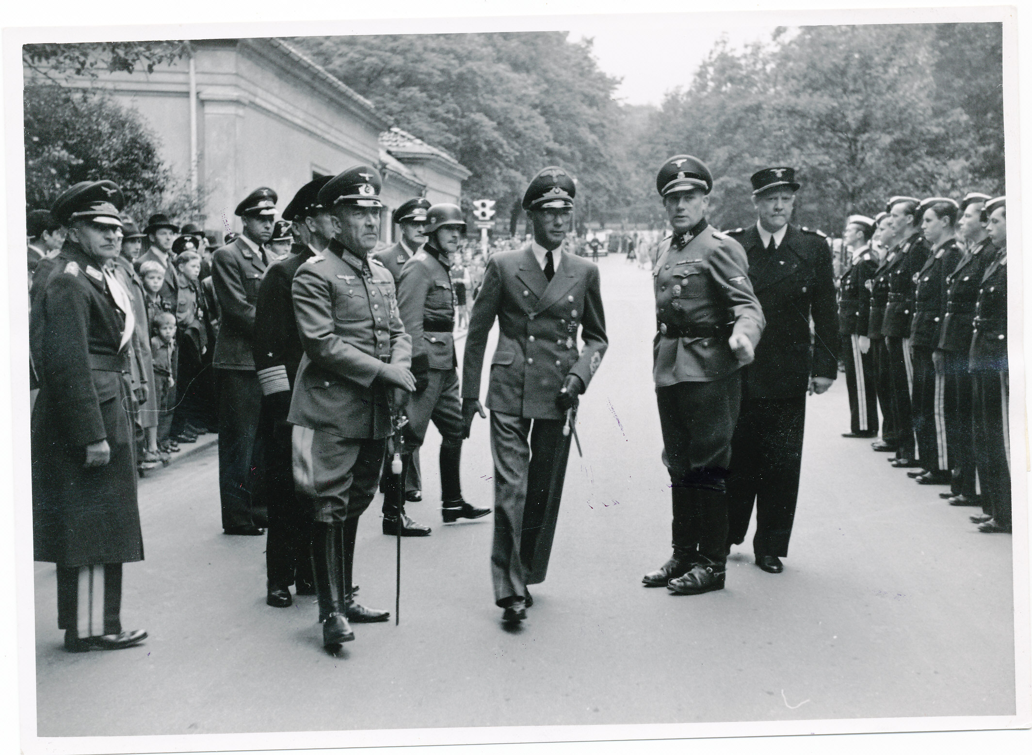 Ministerpräsident Quisling, Reichskommissar Terboven, Wehrmachtbefehlshaber generaloberst von Falkenhorst, der Kommandierende Admiral in Norwegen, Generaladmiral Böhm (verdeckt) und der Vertreter des Oberbefehlshabers der Luftflotte, Befehlshaber im Luftgau, Generalleutnant Harmjanz nach dem Abschreiten der Ehrenformation, september 1942. RA/PA-1614/U/0002/0001/0005 1221